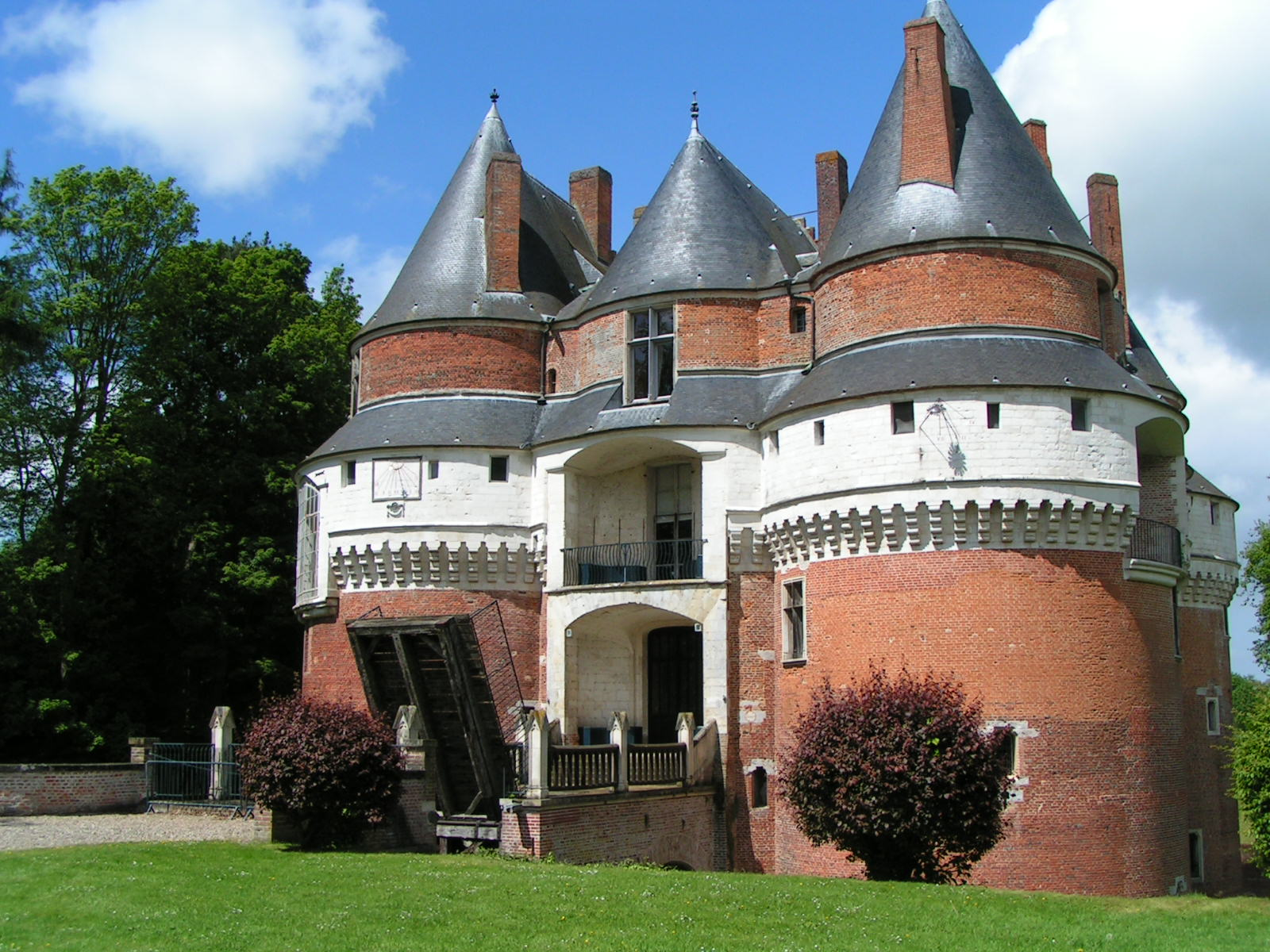 Portal der Burg Rambures